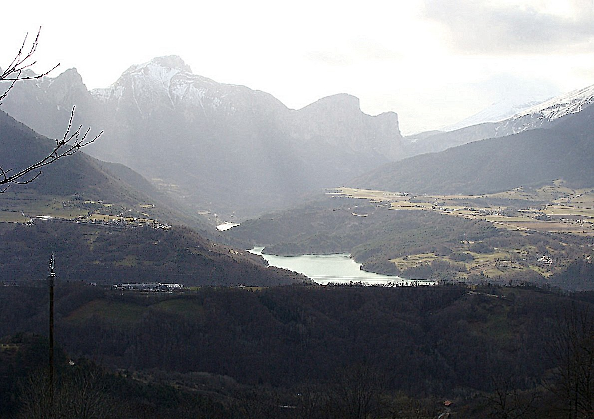 Ambel (à gauche au second plan) face à la plaine de Pellafol (à droite) ; entre eux la branche ouest du lac du Sautet.